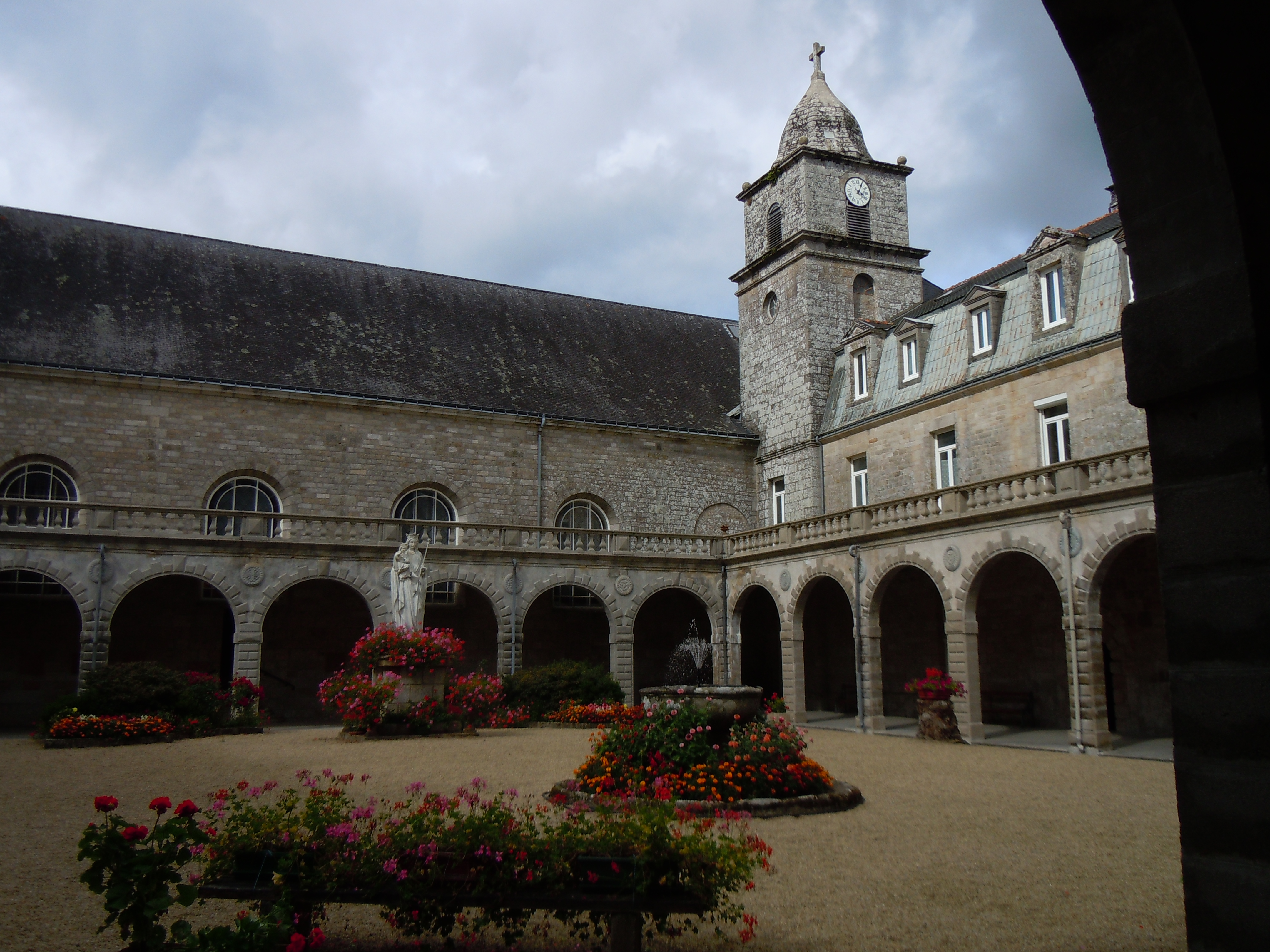 cloître de l'abbaye Notre-Dame de Langonnet, département du Morbihan, France